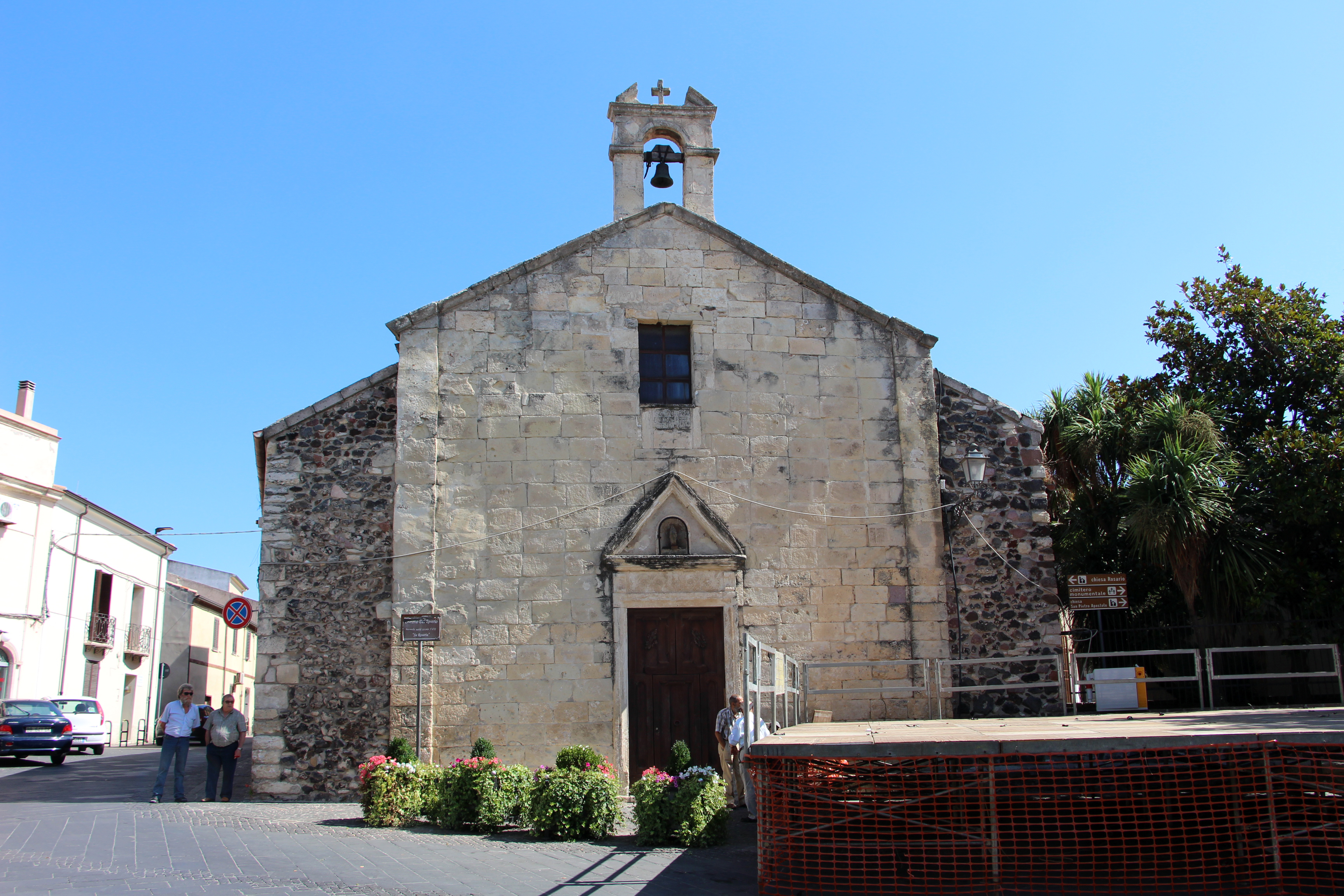 Ploaghe, SS